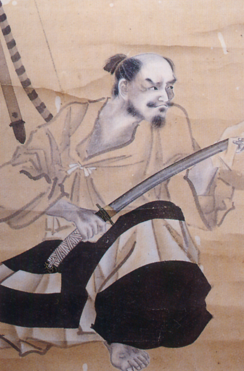 馬場信房 Baba Nobufusa.